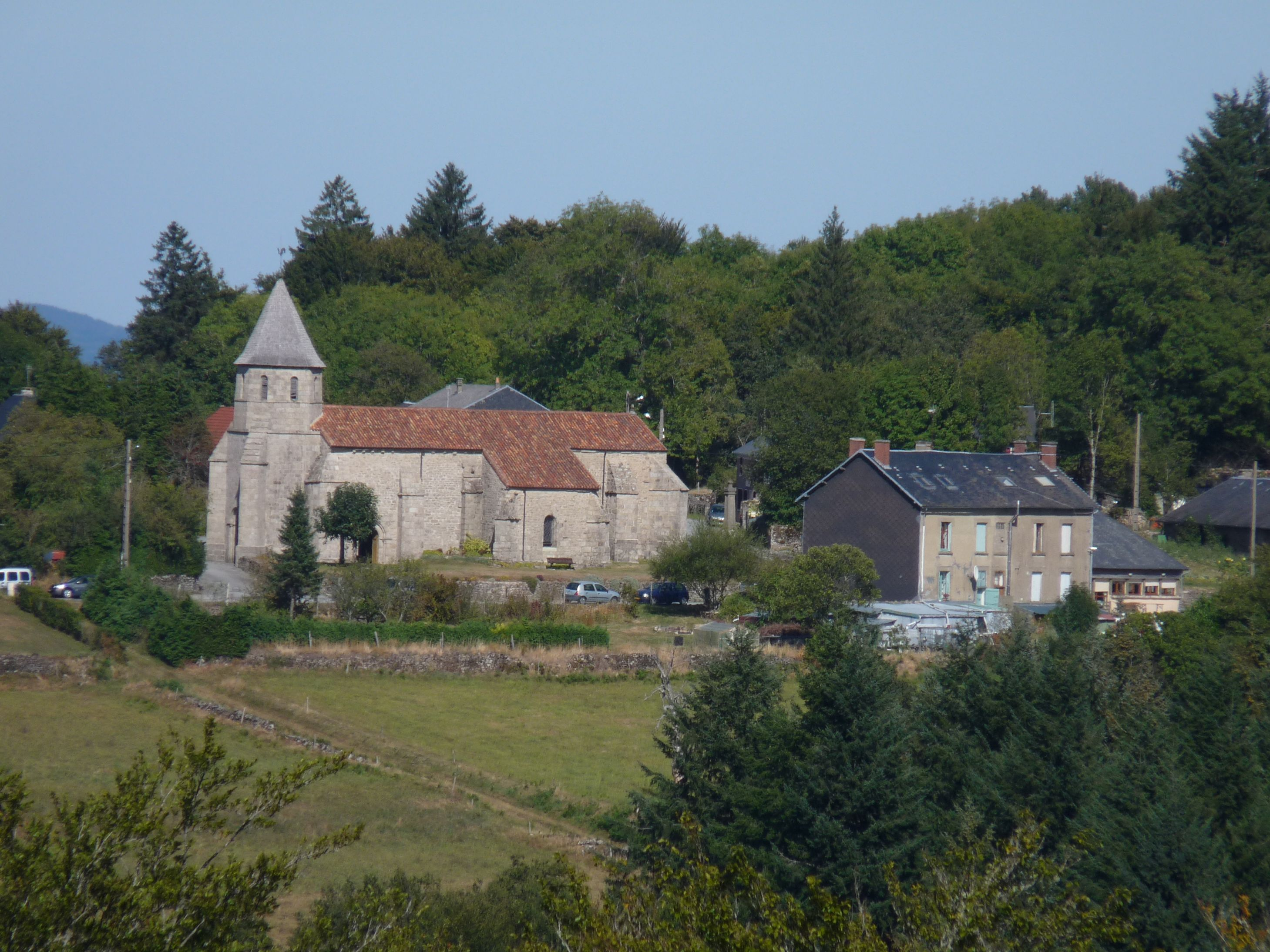 Saint-Gousaud en Creuse depuis le Puy de Jouer